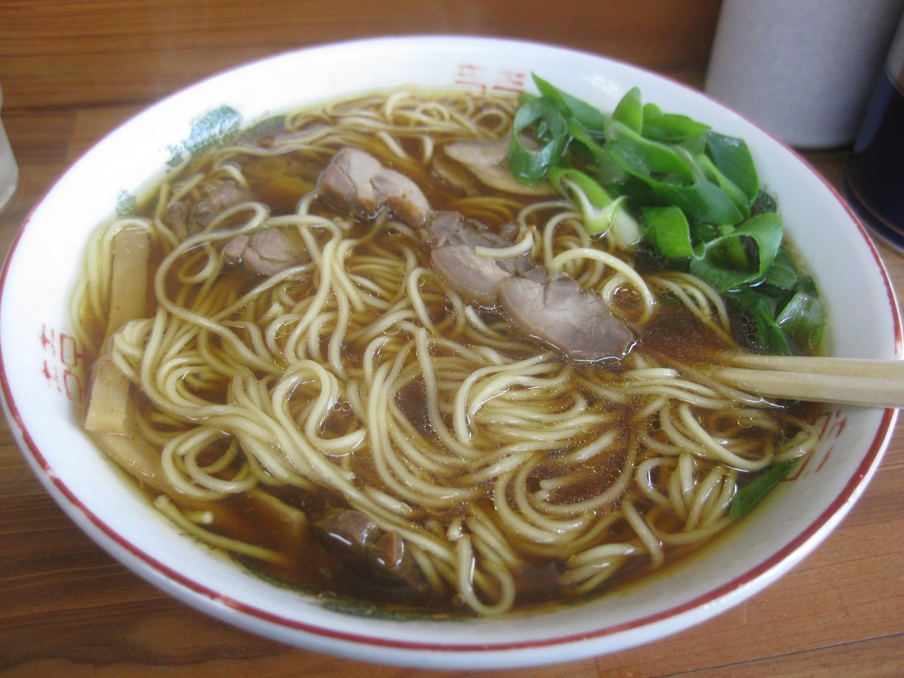 岡山県笠岡市の笠岡ラーメン。「中華そば いではら」にて撮影。